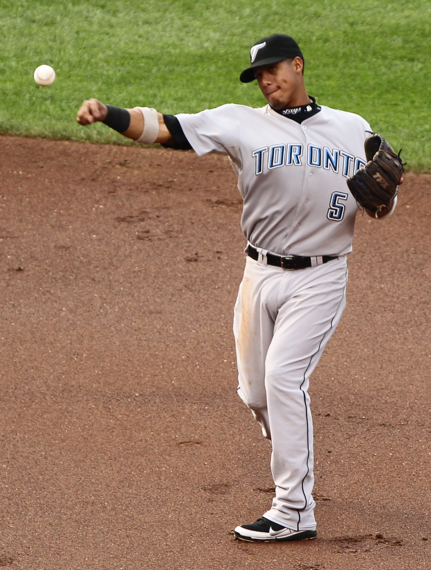 Yunel Escobar